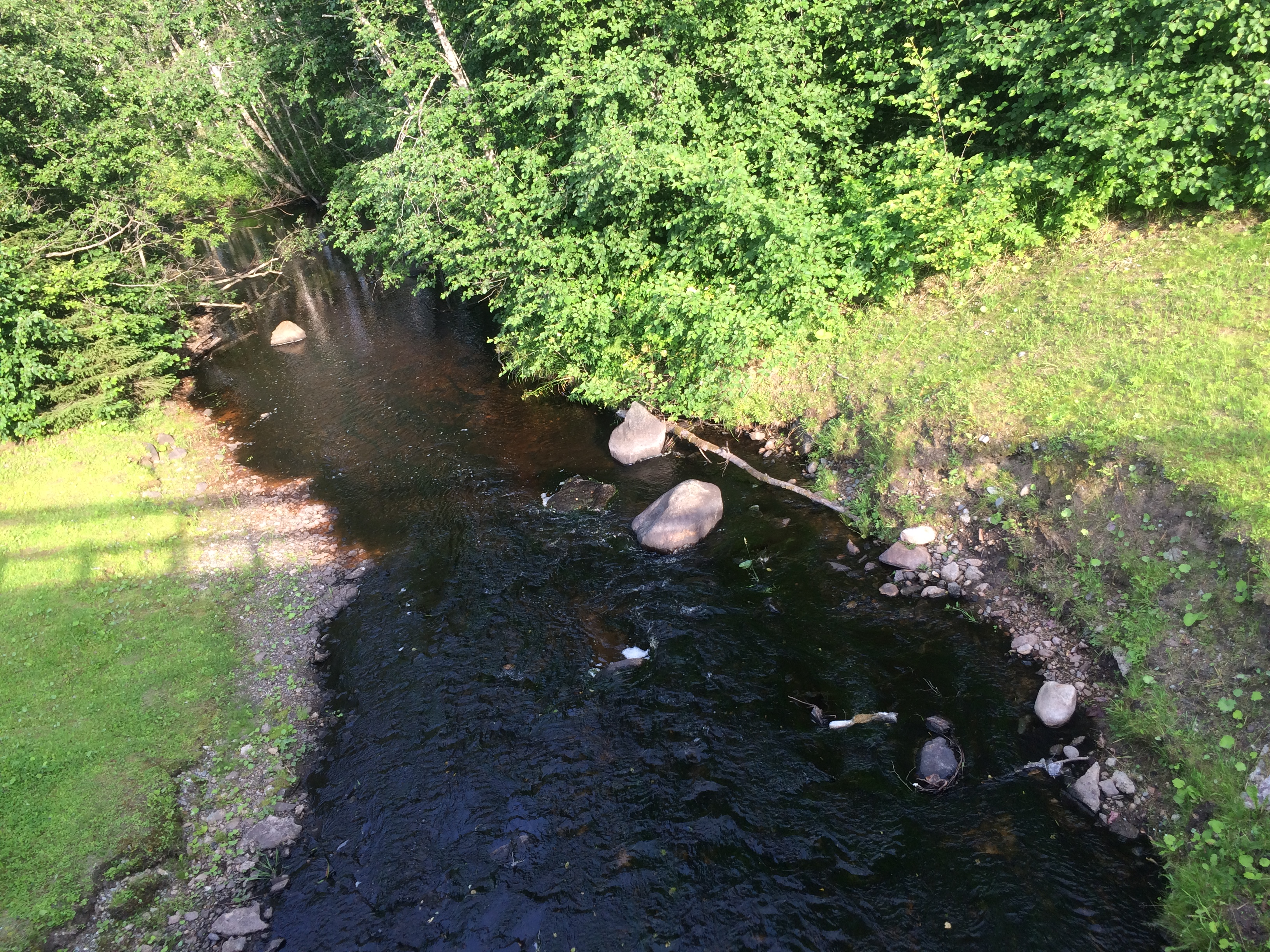 Елгамка